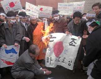 مردم خشمگین کره جنوبی